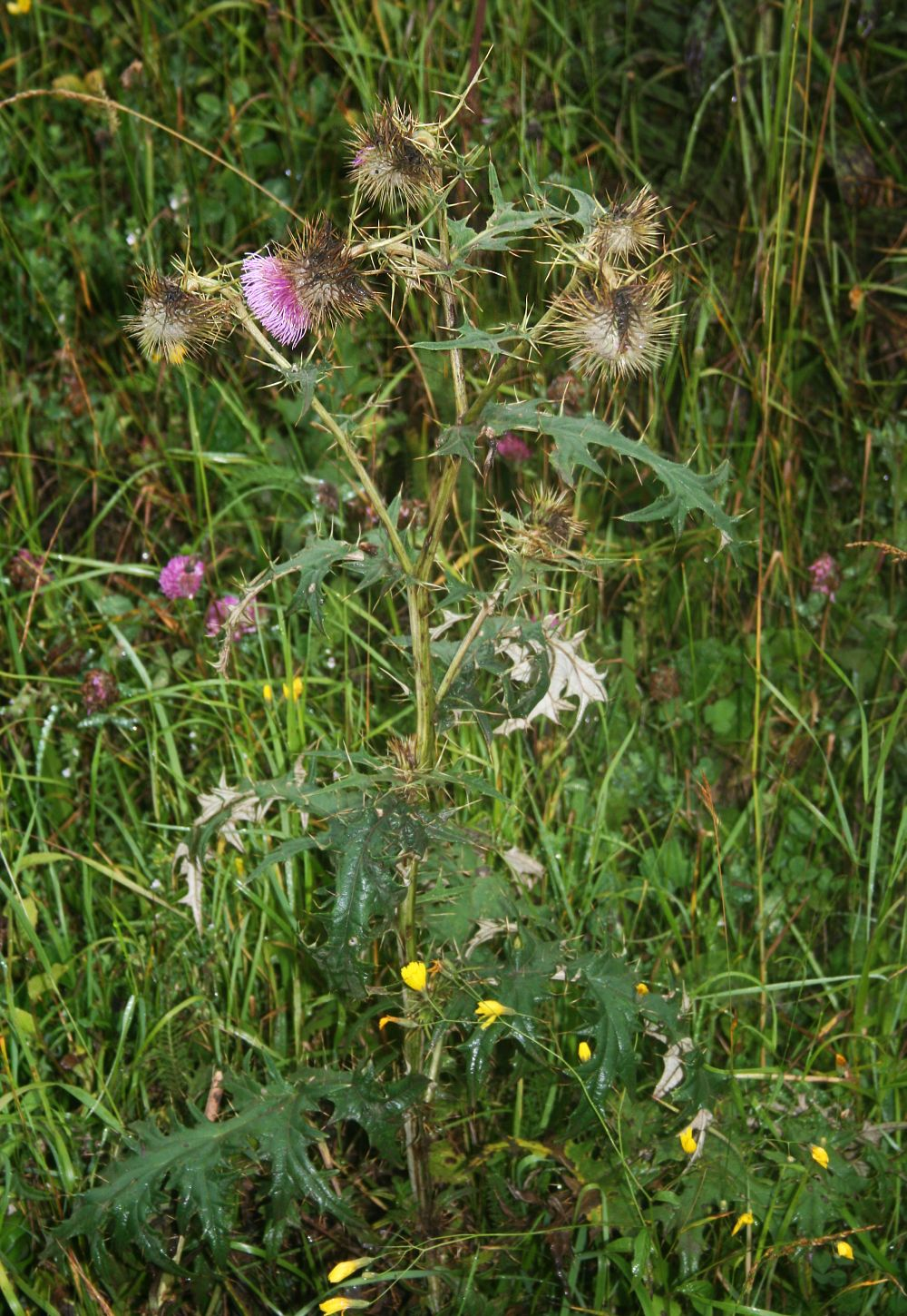 Cirsium caucasicum, Korbblütler (Asteraceae) – Georgien/საქართველო: Kleiner Kaukasus, S Bakuriani/ბაკურიანი, ca. 1750 m s.m.